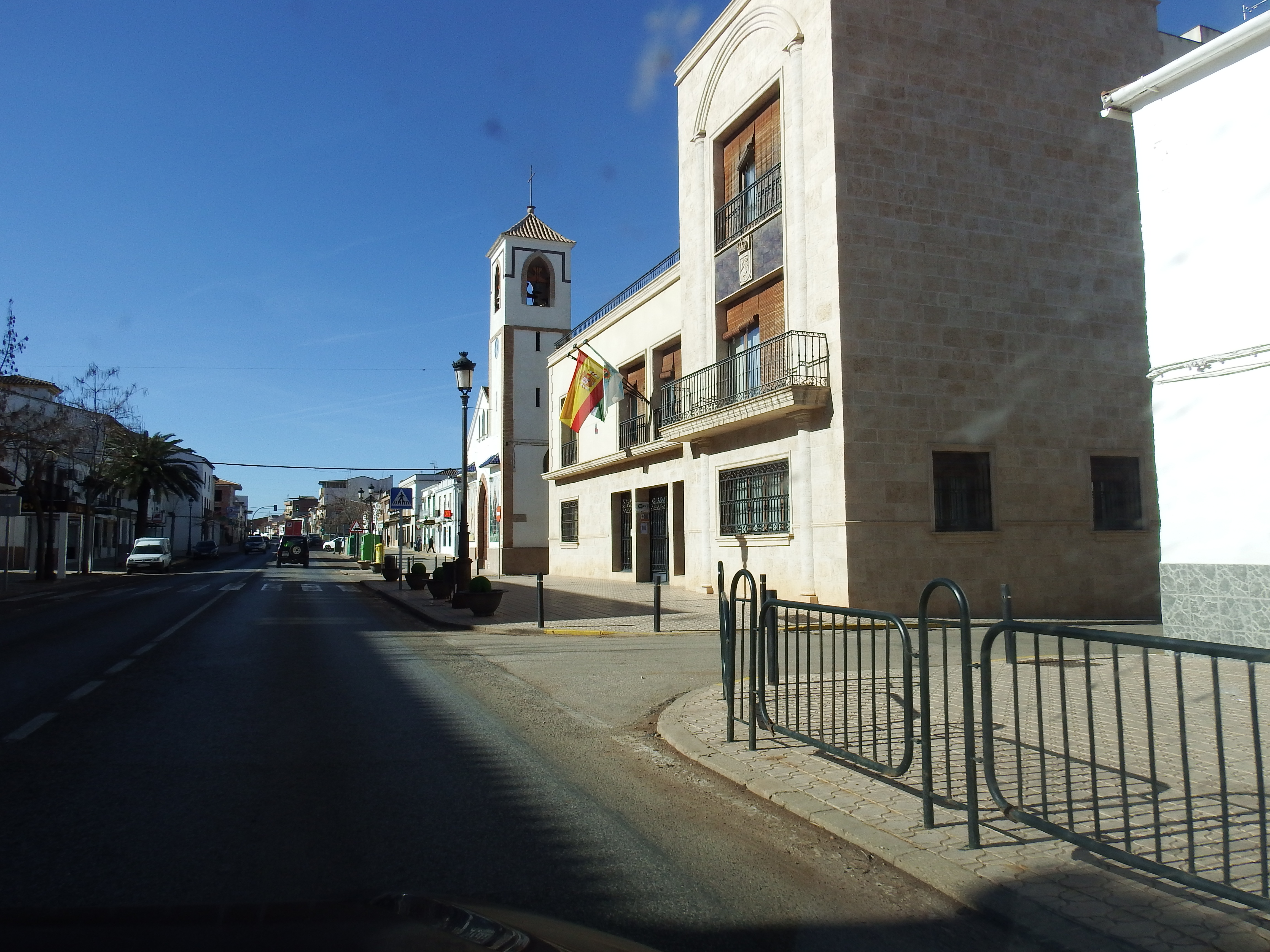 Ayuntamiento Arroyo del Ojanco